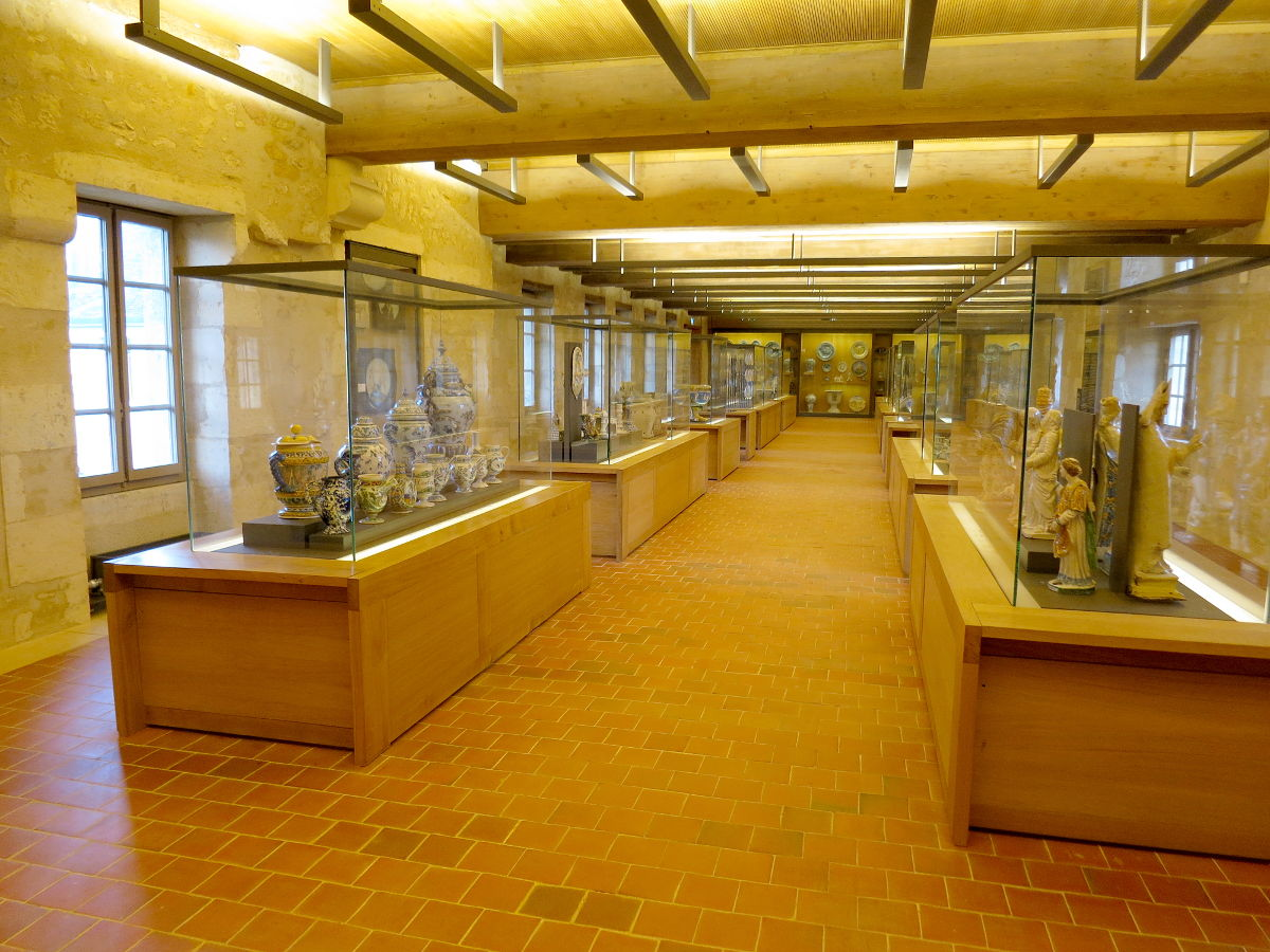 Musée de la faïence, Nevers